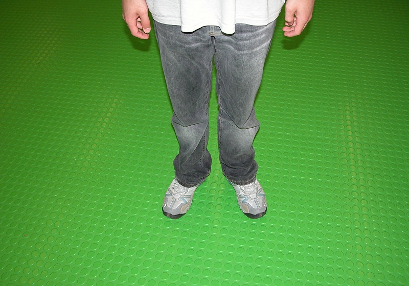 Green plastic floor at the Neue Staatsgalerie, Stuttgart, Deutschland, Germany